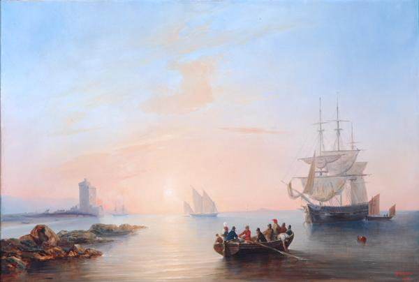 Seascape Sunsetlabel QS:Len,"Seascape Sunset" label QS:Lfr,"lever de soleil sur la mer"